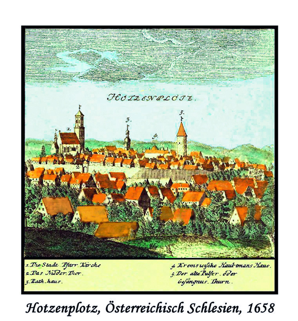 Stadtansicht von Hotzenplotz